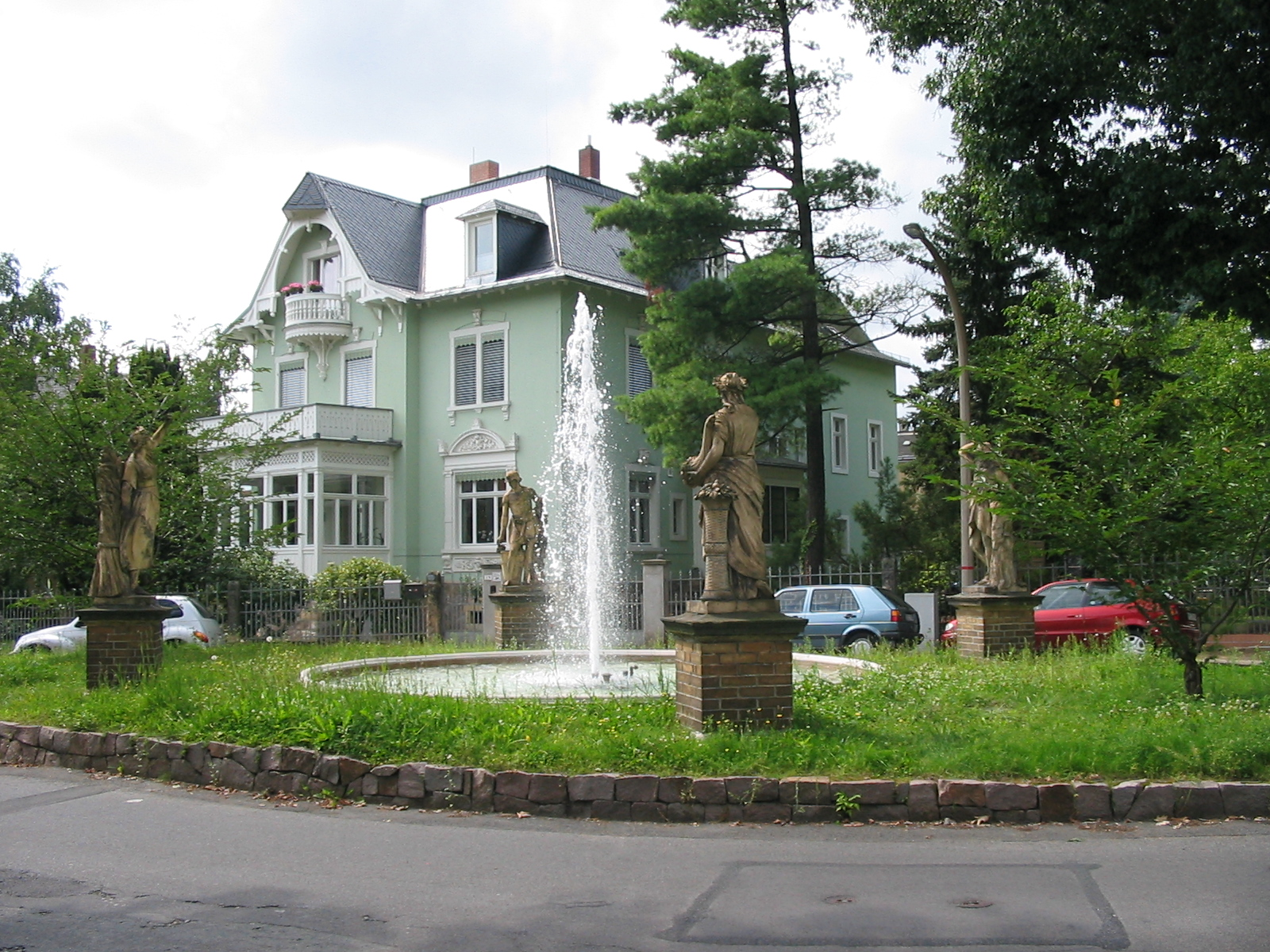 Radebeul Mietvilla Dr.-Schmincke-Allee 19